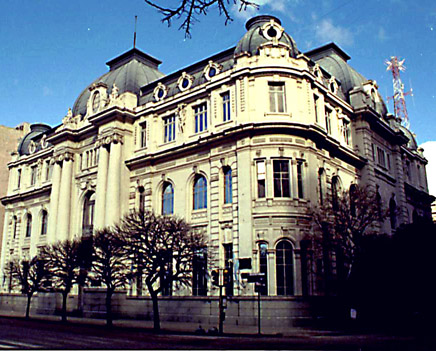 Banco Nación, Bahía Blanca Photographie personnelle de Mbertoni.